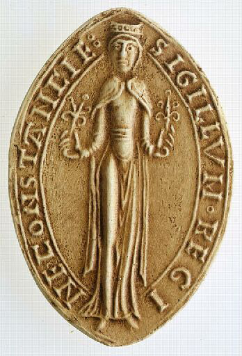 Moulage de la matrice du sceau de Constance de Castille, reine de France, seconde femme du roi Louis VII le Jeune. Légende en latin : "SIGILLUM REGINE CONSTANCIE" Traduction : sceau de la reine Constance.